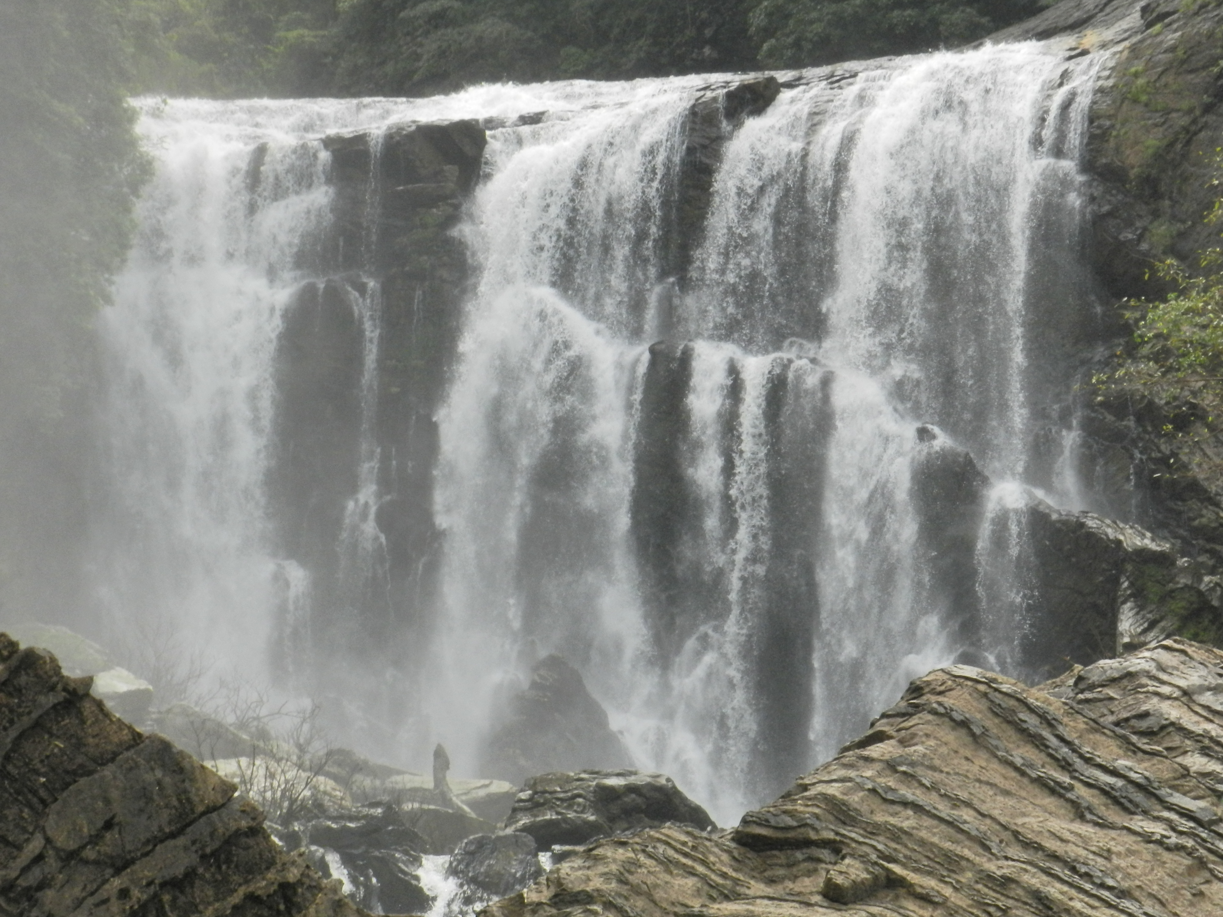 ಕನ್ನಡ: ಸಾತೋಡಿ ಜಲಪಾತದ ನೋಟ